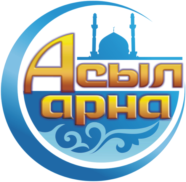 Логотип